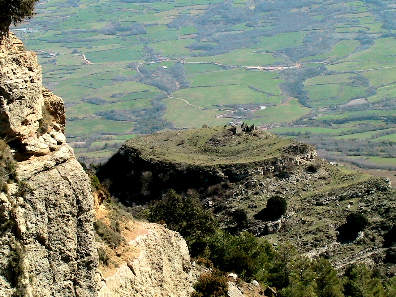 Runes del Castell de Toló des del Tossal del Vigatà